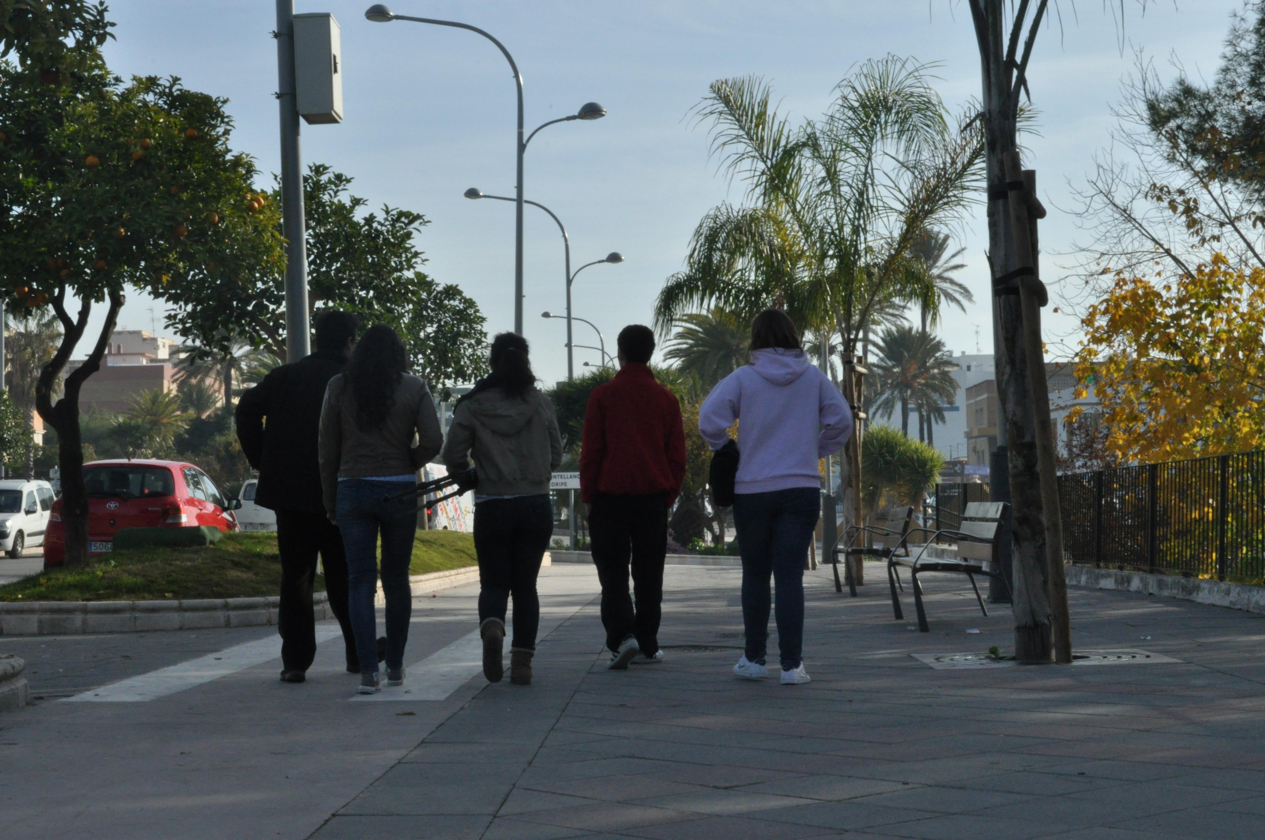 Paseando por la Alameda de Morón de la Frontera